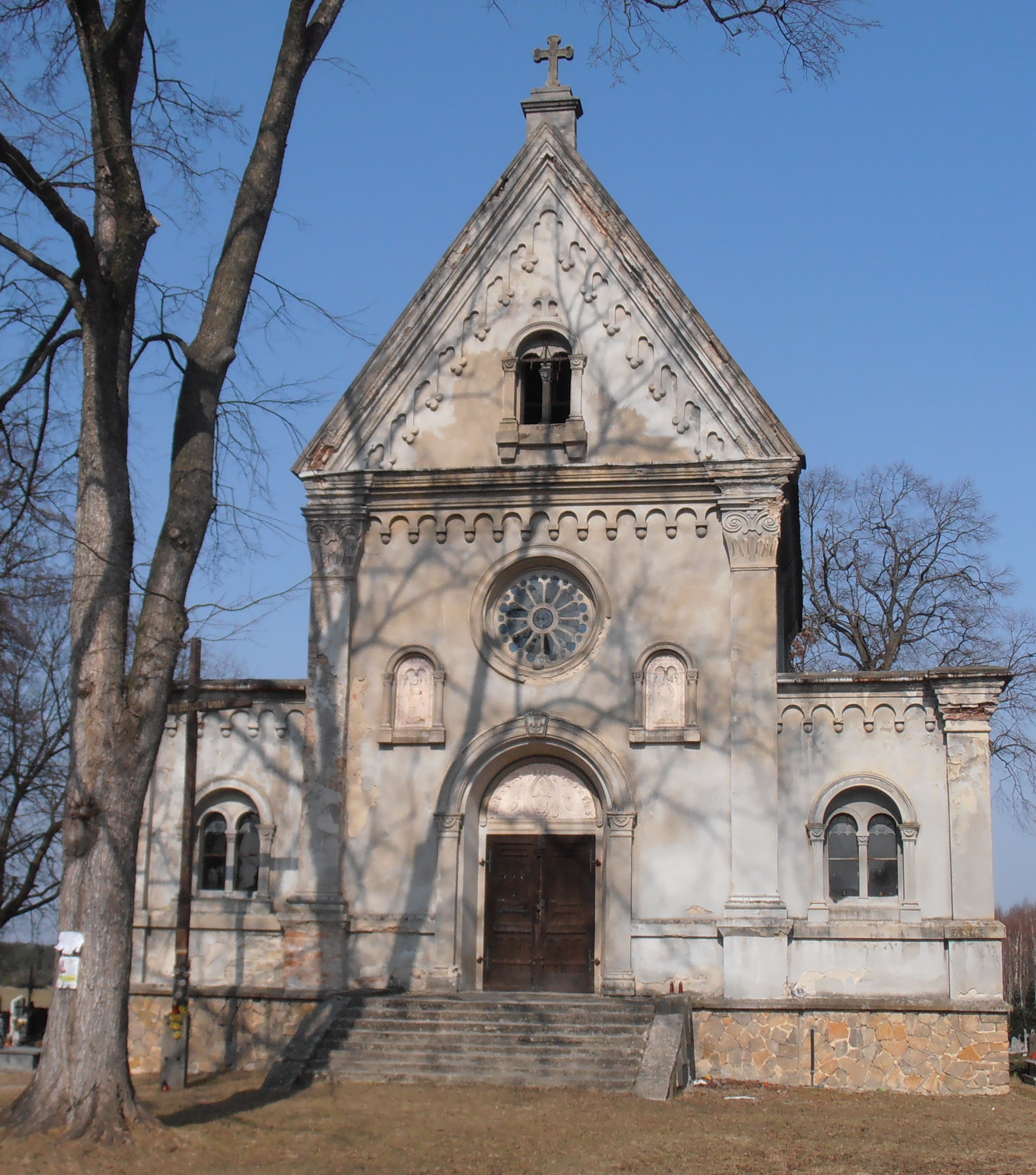 Kaplica cmentarna św. Barbary w Maluszynie (zabytek 400/86)